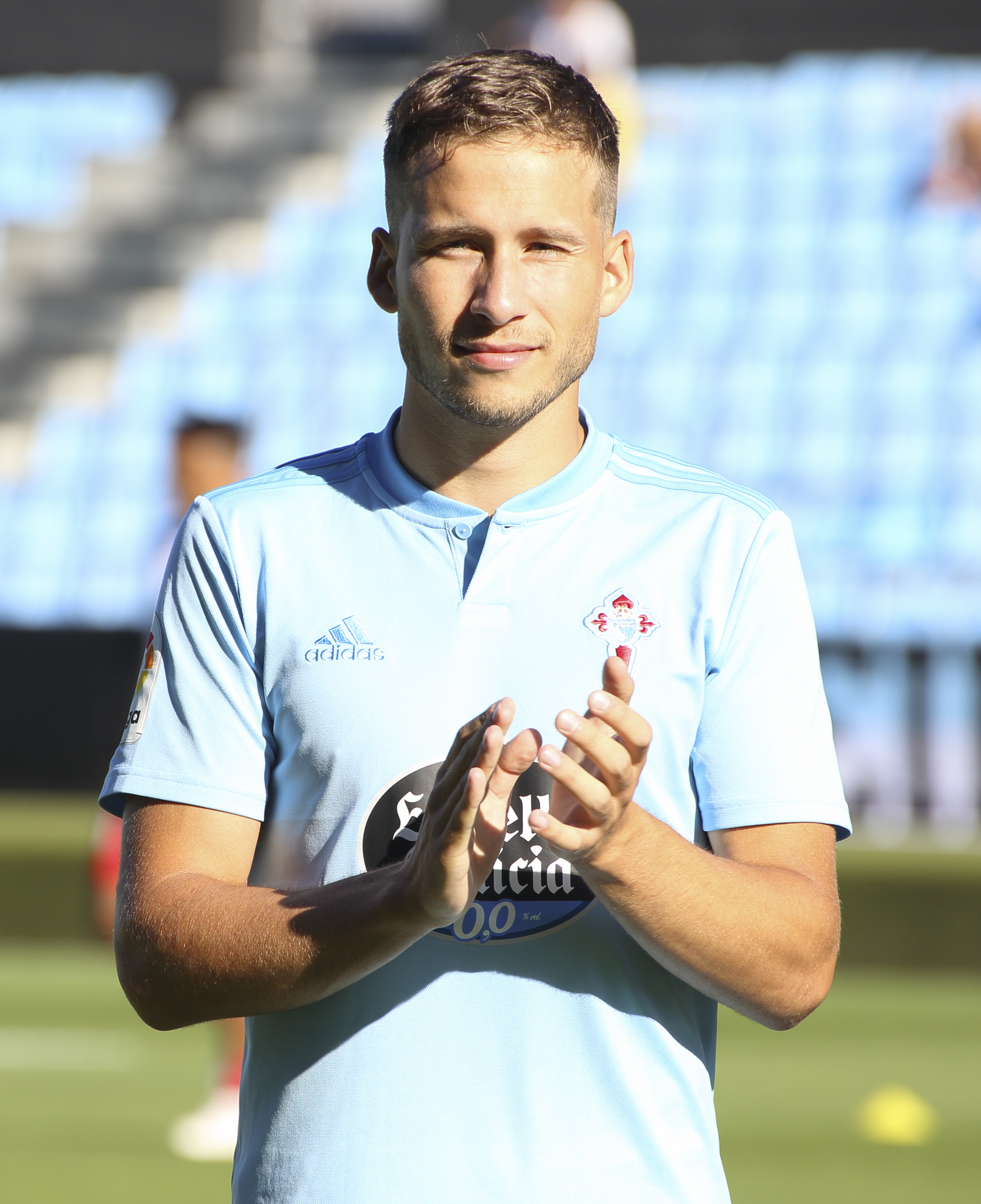 Presentación RC Celta - Temporada 18/19